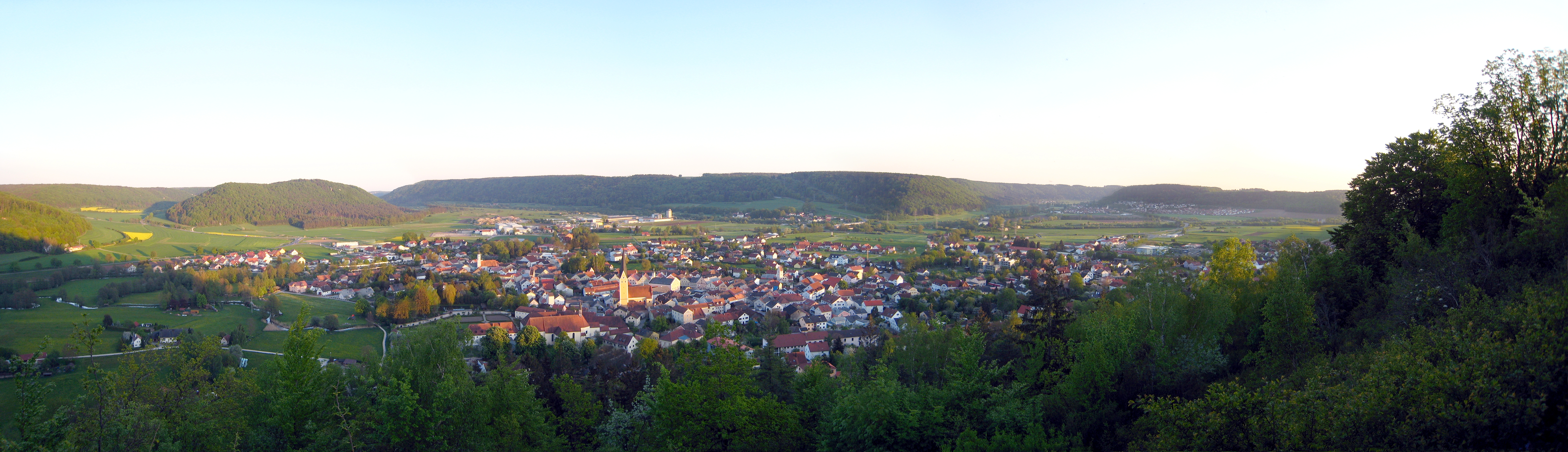 Ausblick auf Dietfurt a. d. Altmühl mit Blickrichtung Süden, vom Kreuzberg aus.